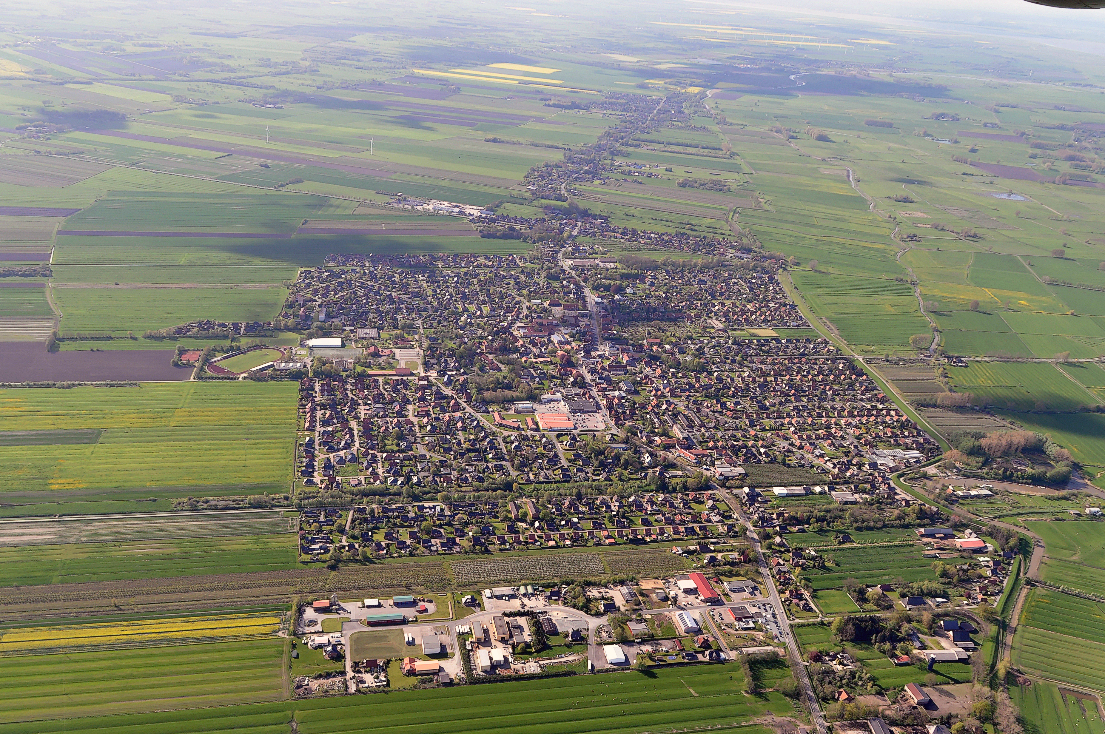 Luftbilder von der Nordseeküste 2012-05